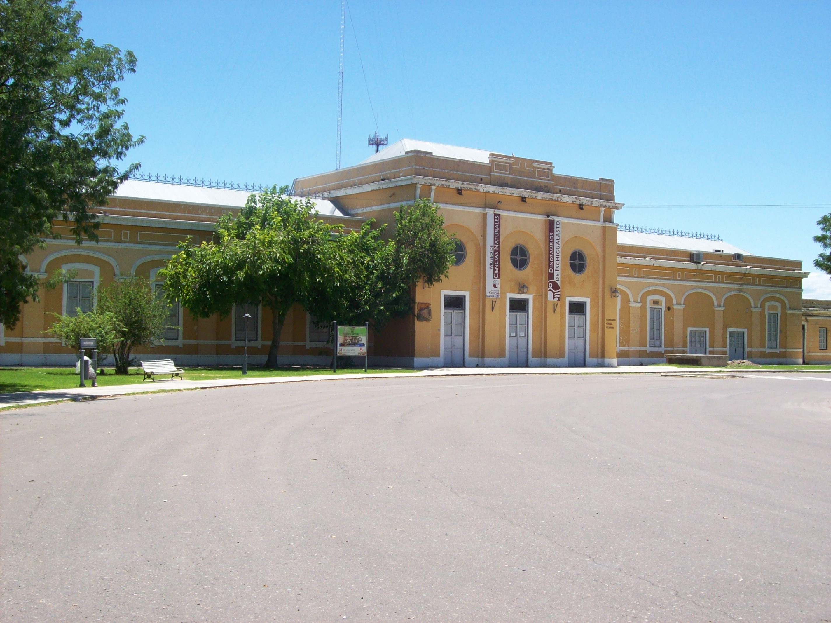 Museo de Ciencias Naturales de San Juan, Argentina, en el edificio perteneciente a la antigua estación de trenes San Juan del Ferrocarril General Belgrano.